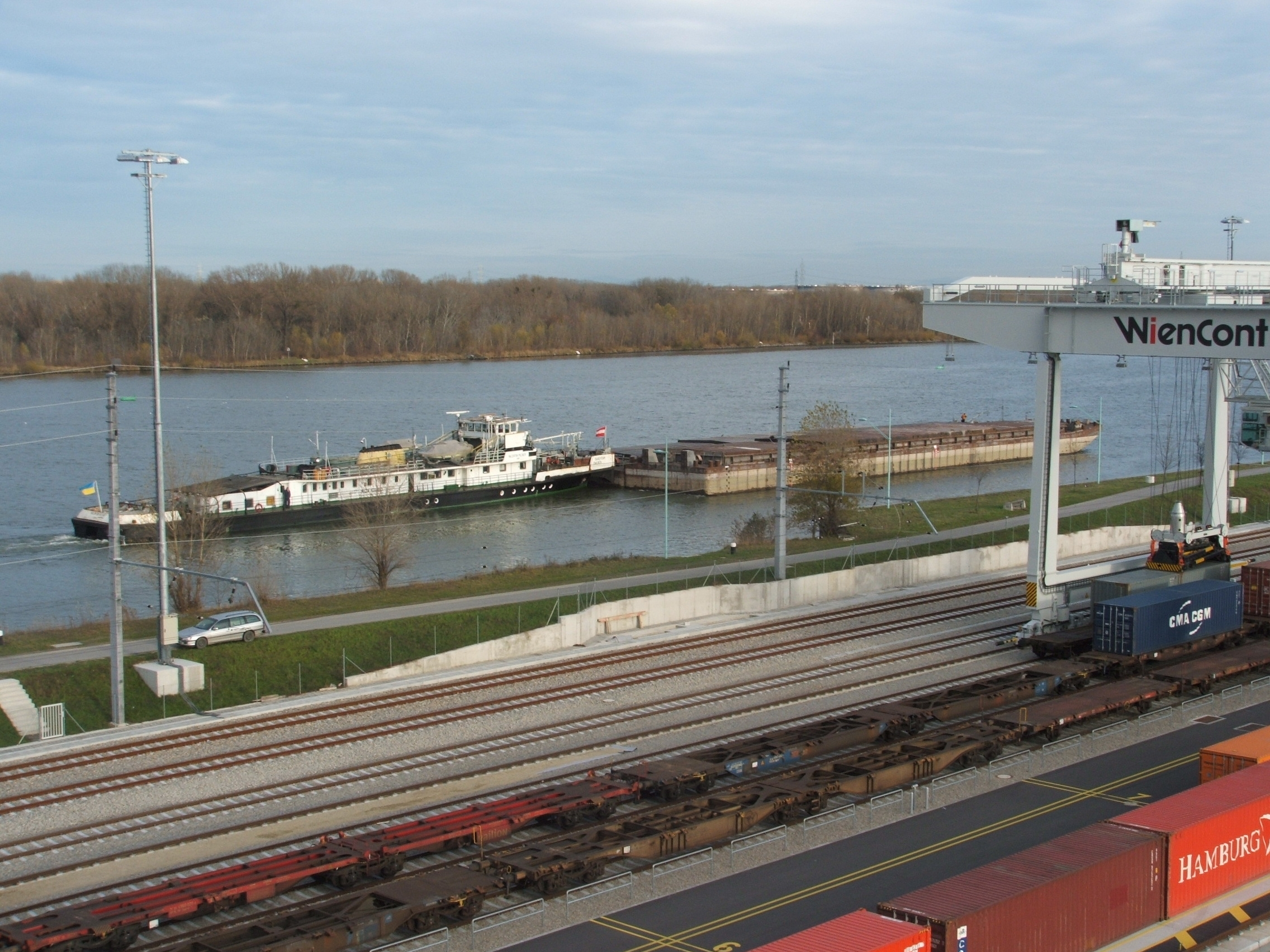 Terminal Freudenau